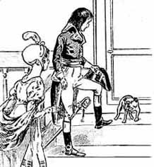 Napoléon, Joséphine et son carlin Fortuné